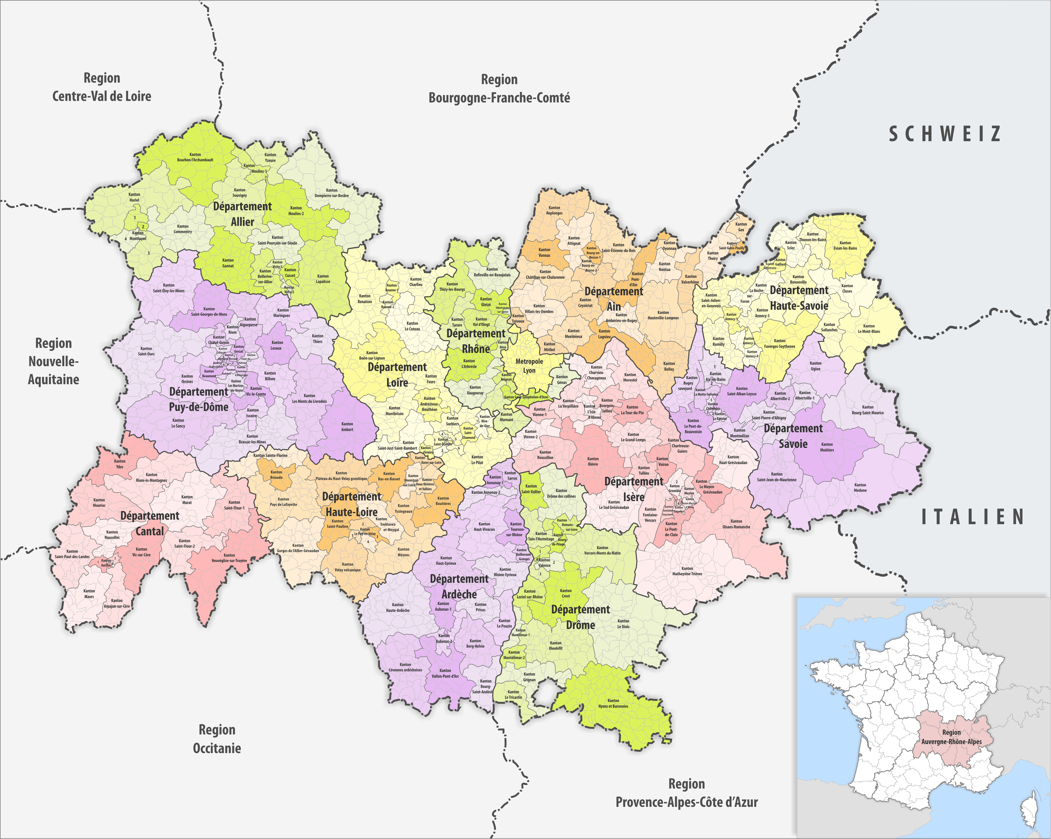 Kantone in der Region Auvergne-Rhône-Alpes